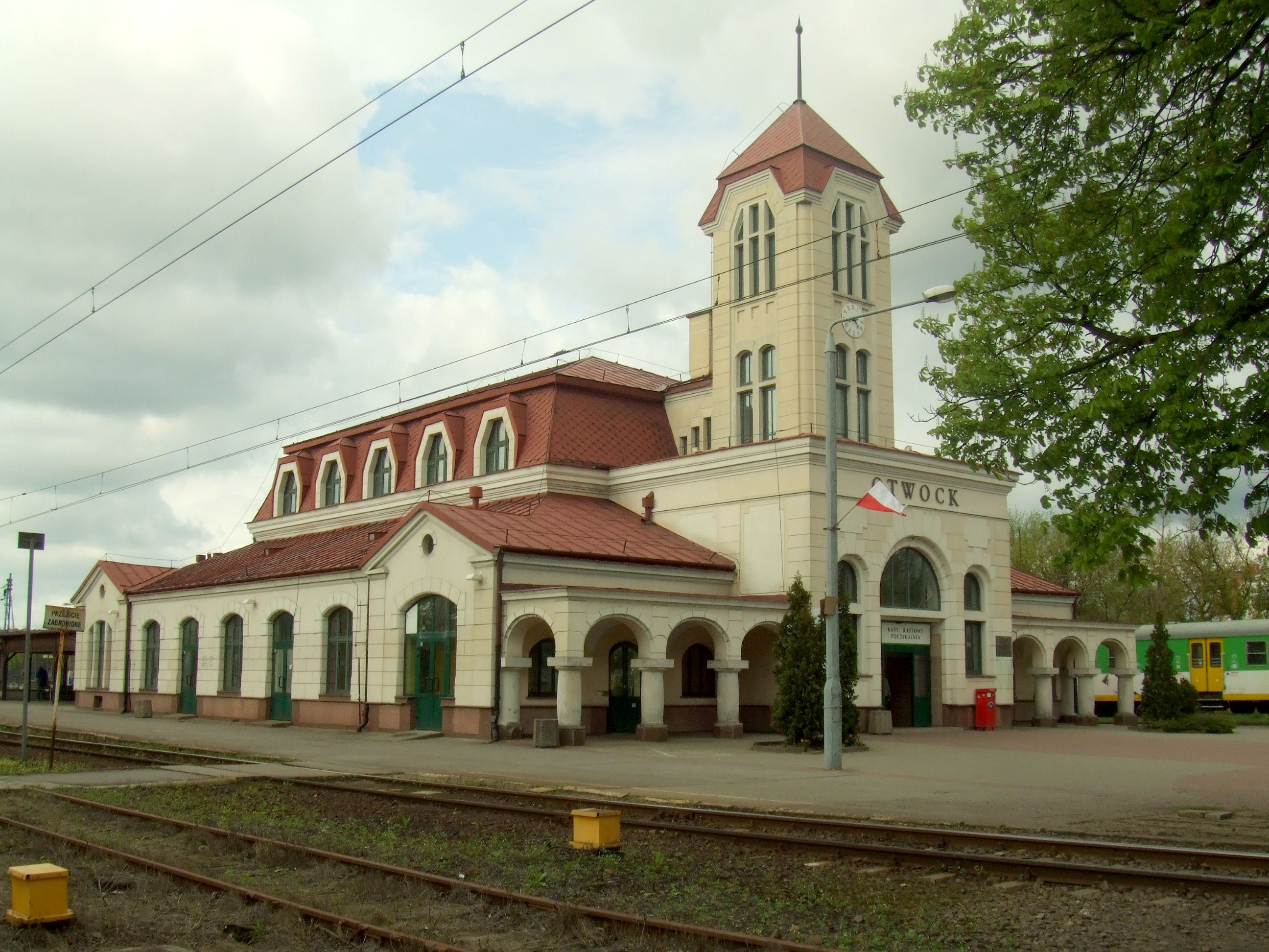 Dworzec kolejowy w Otwocku - przód